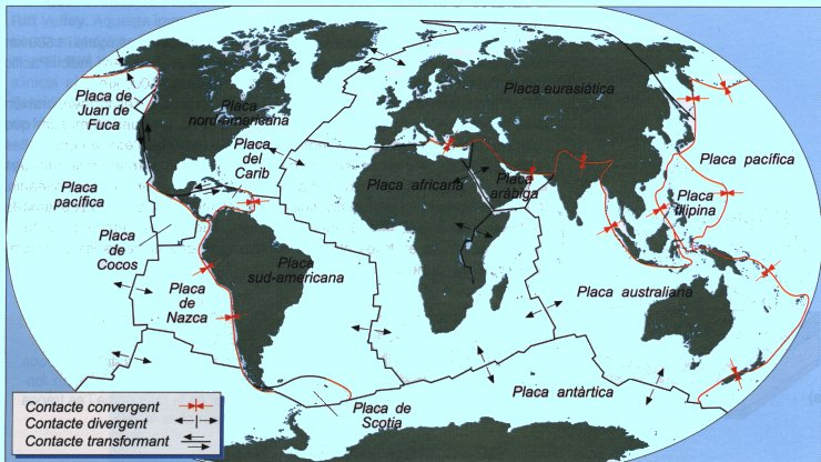 O imagine a placilor tectonice globale